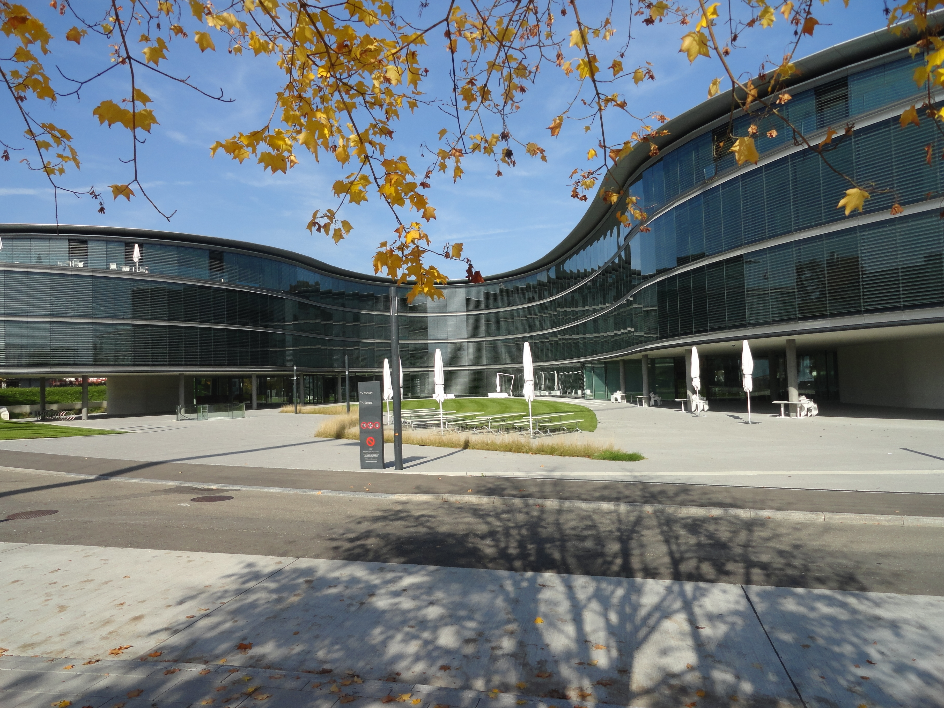 Swarovskihaus in Männedorf ZH